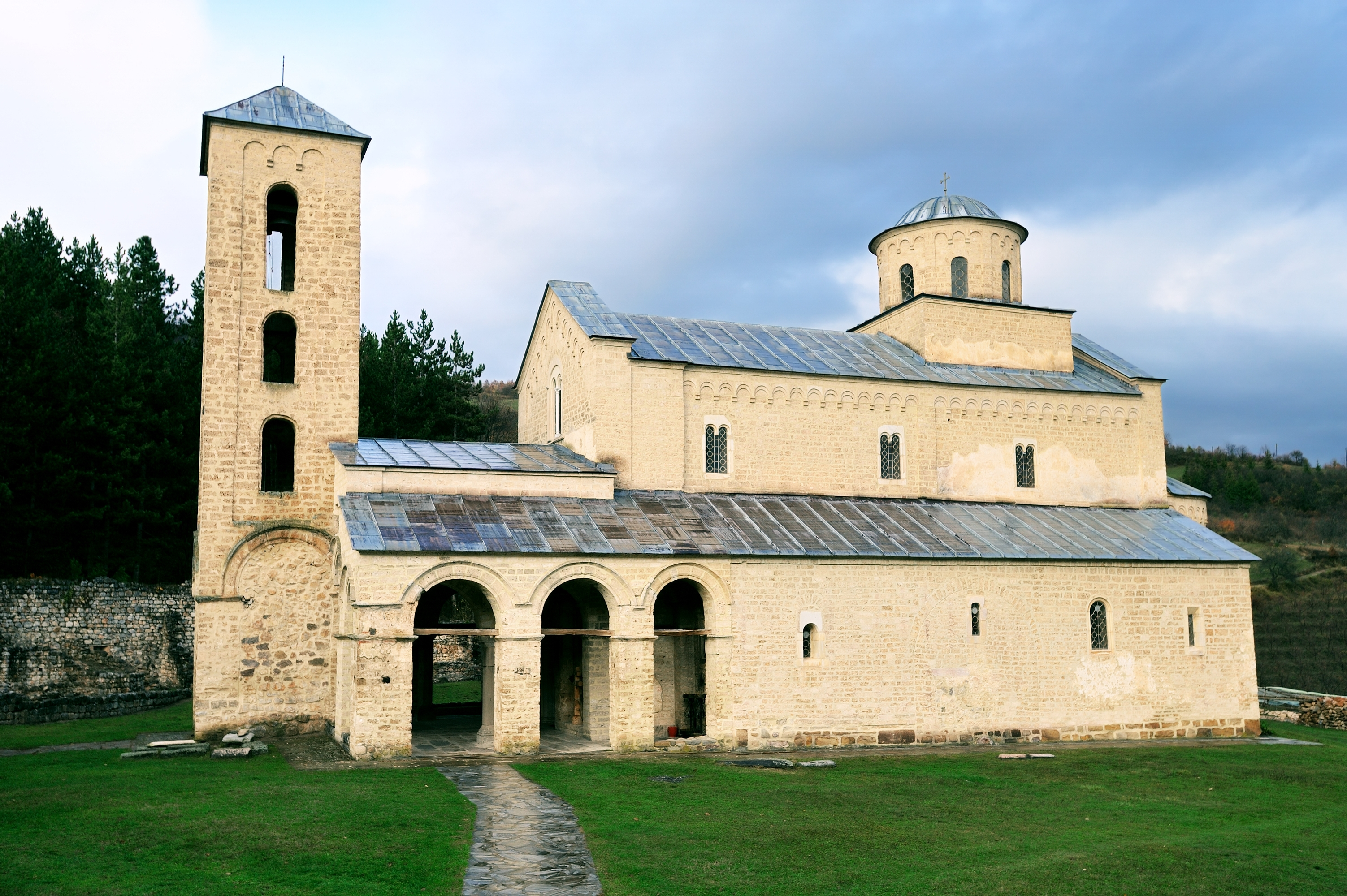 Manastir Sopocani